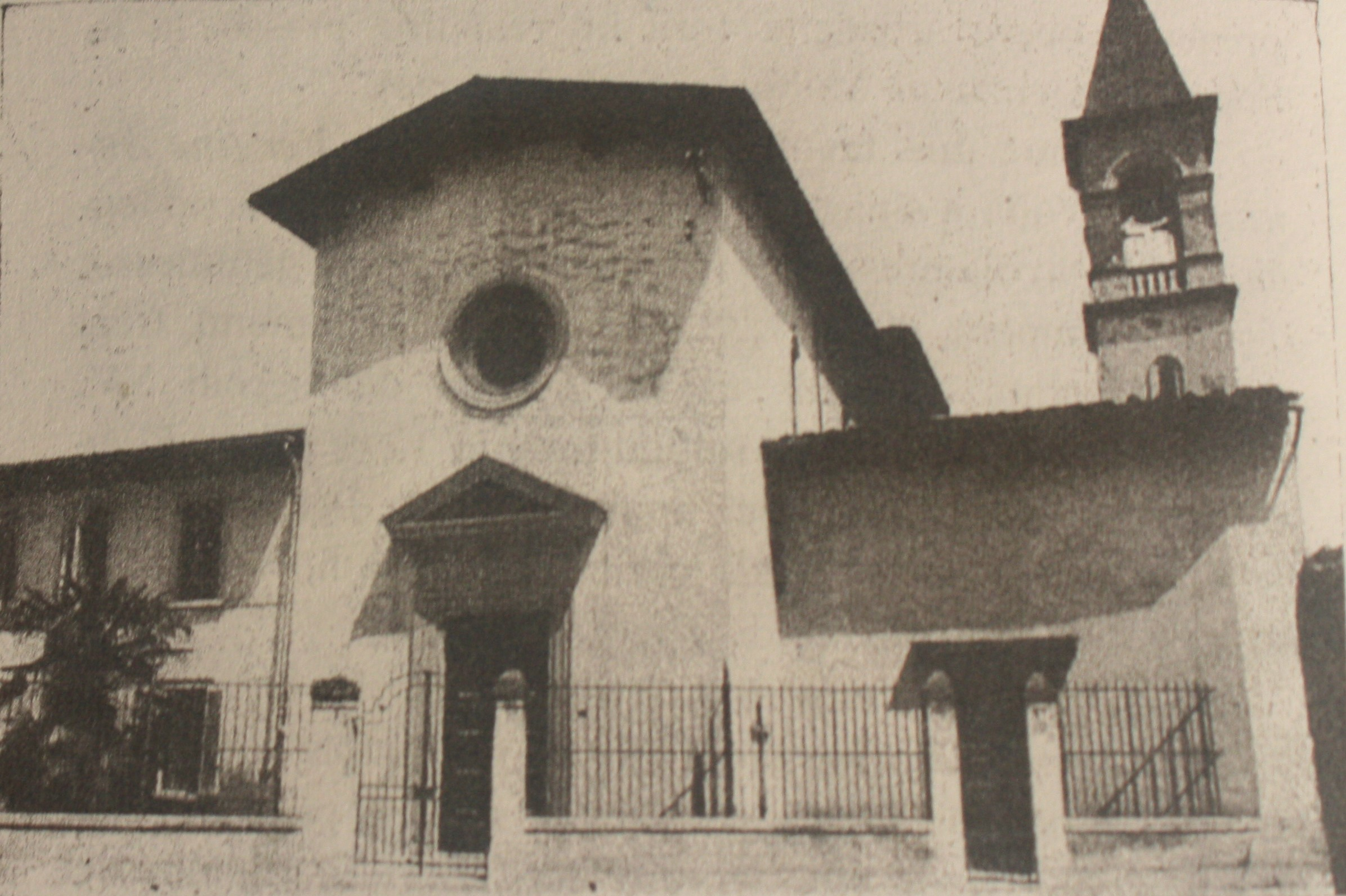 Esterno della Chiesa di San Quirico a Legnaia negli anni Trenta, foto in bianco e nero